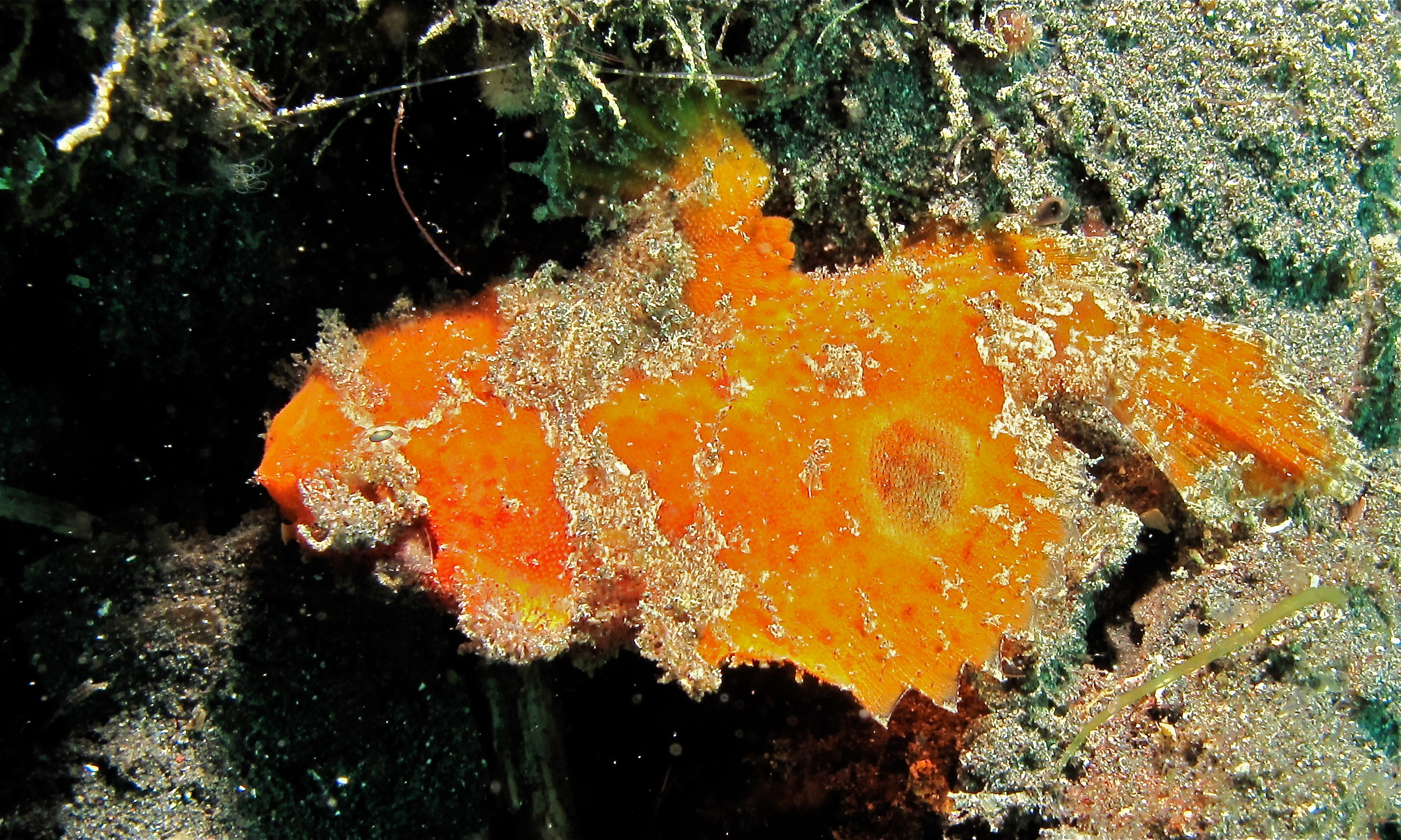 Tanjung Tebal, Lembeh Strait, Sulawesi, INDONESIA